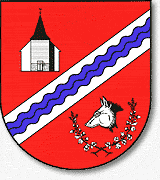 Coat of arms Ahausen, Wappen der Gemeinde Ahausen